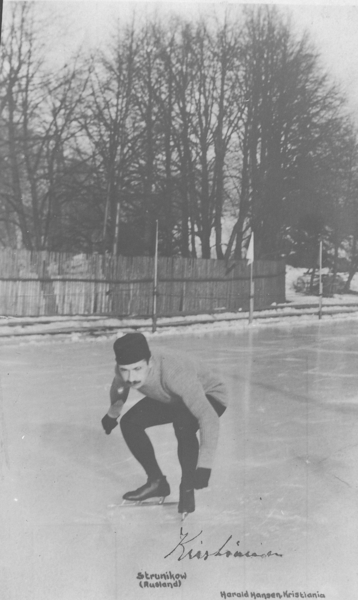 Nikolay Strunnikov, russisk skøyteløper klar til start i Kristiania/Oslo